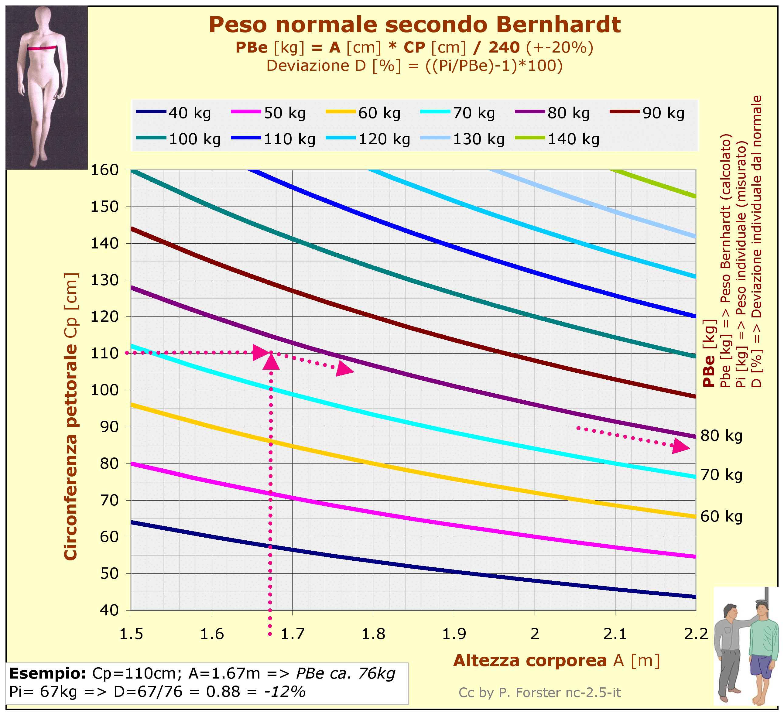 biometria, peso corporeo umano, normale, Bernhardt, circonferenza pettorale, toracica, altezza corporea, deviazione